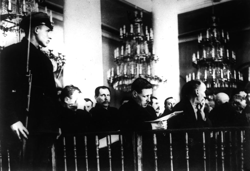 Подсудимые во время Шахтинского процесса.